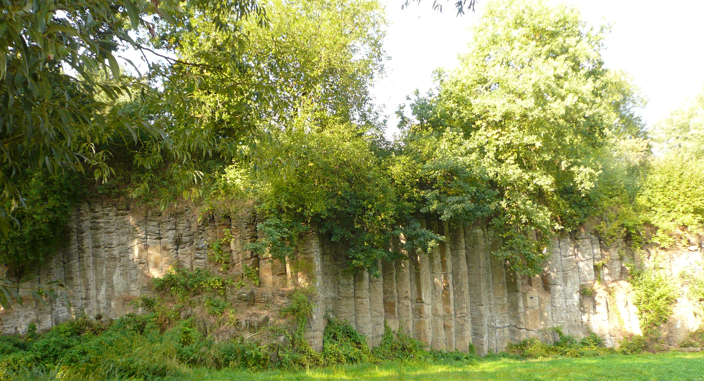 Stillgelegter Basaltbruch mit typischen Basaltsäulen in Bühren, Landkreis Göttingen, Niedersachsen